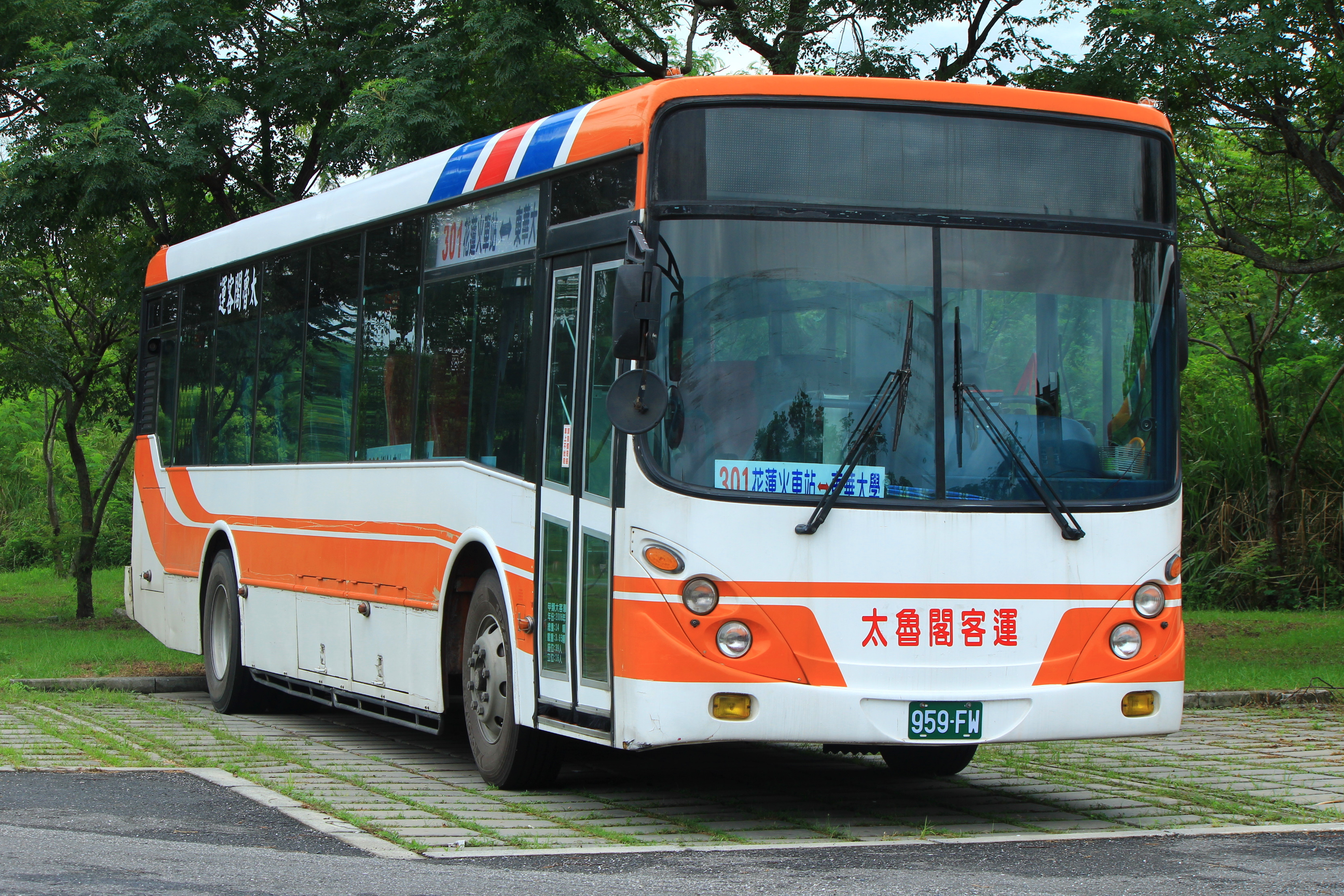 中文（台灣）: 前北客櫻花車~